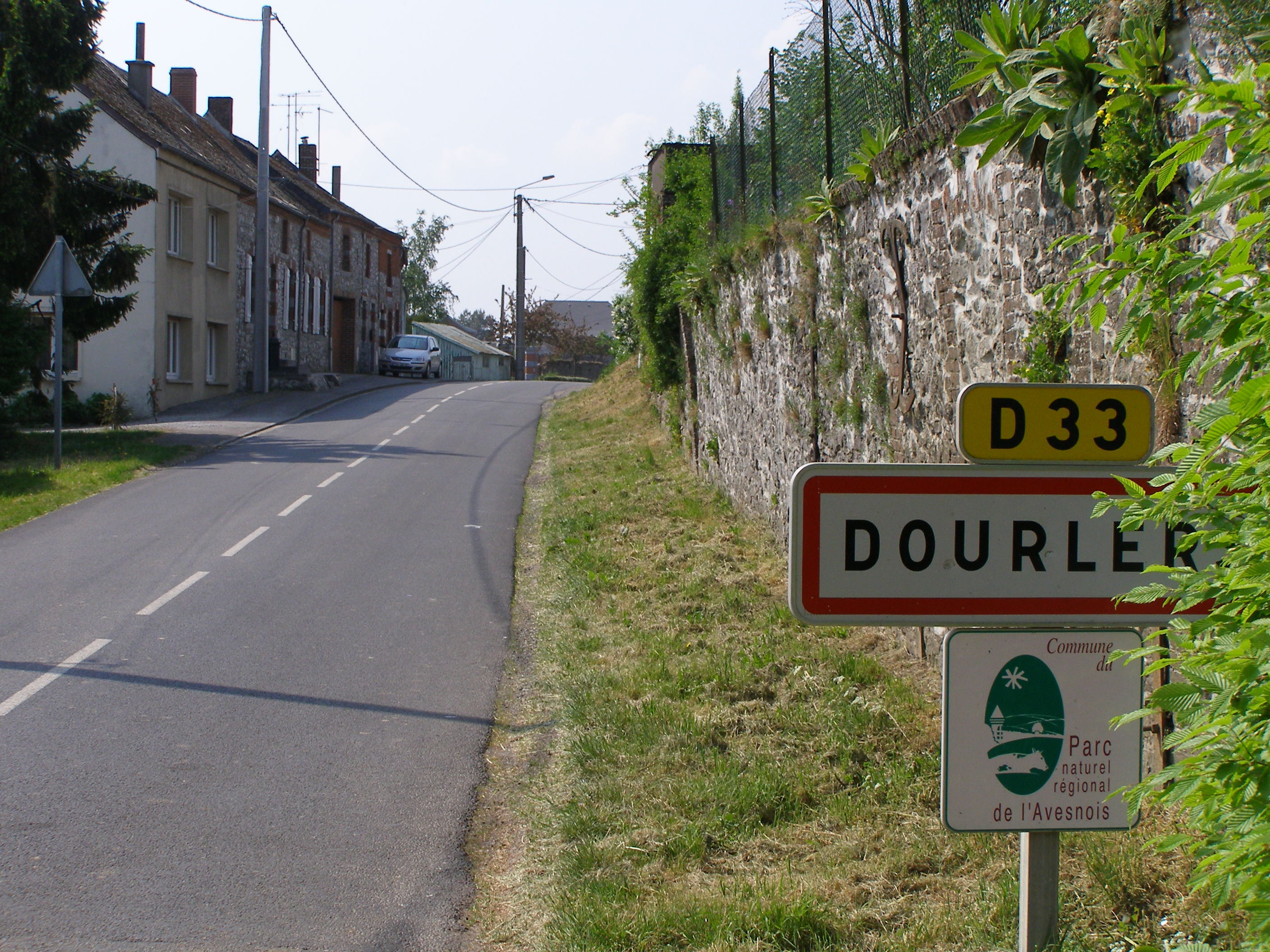 Entrée du village.